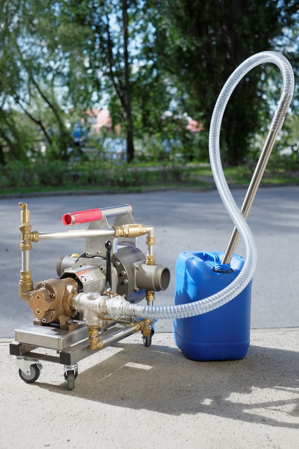 Переносная версия дозатора FIREMIKS